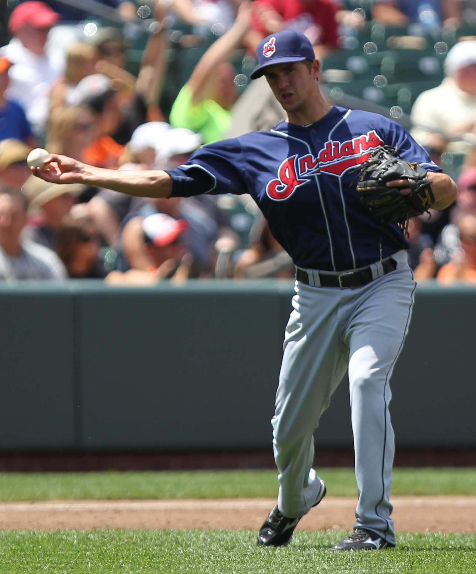 Lonnie Chisenhall